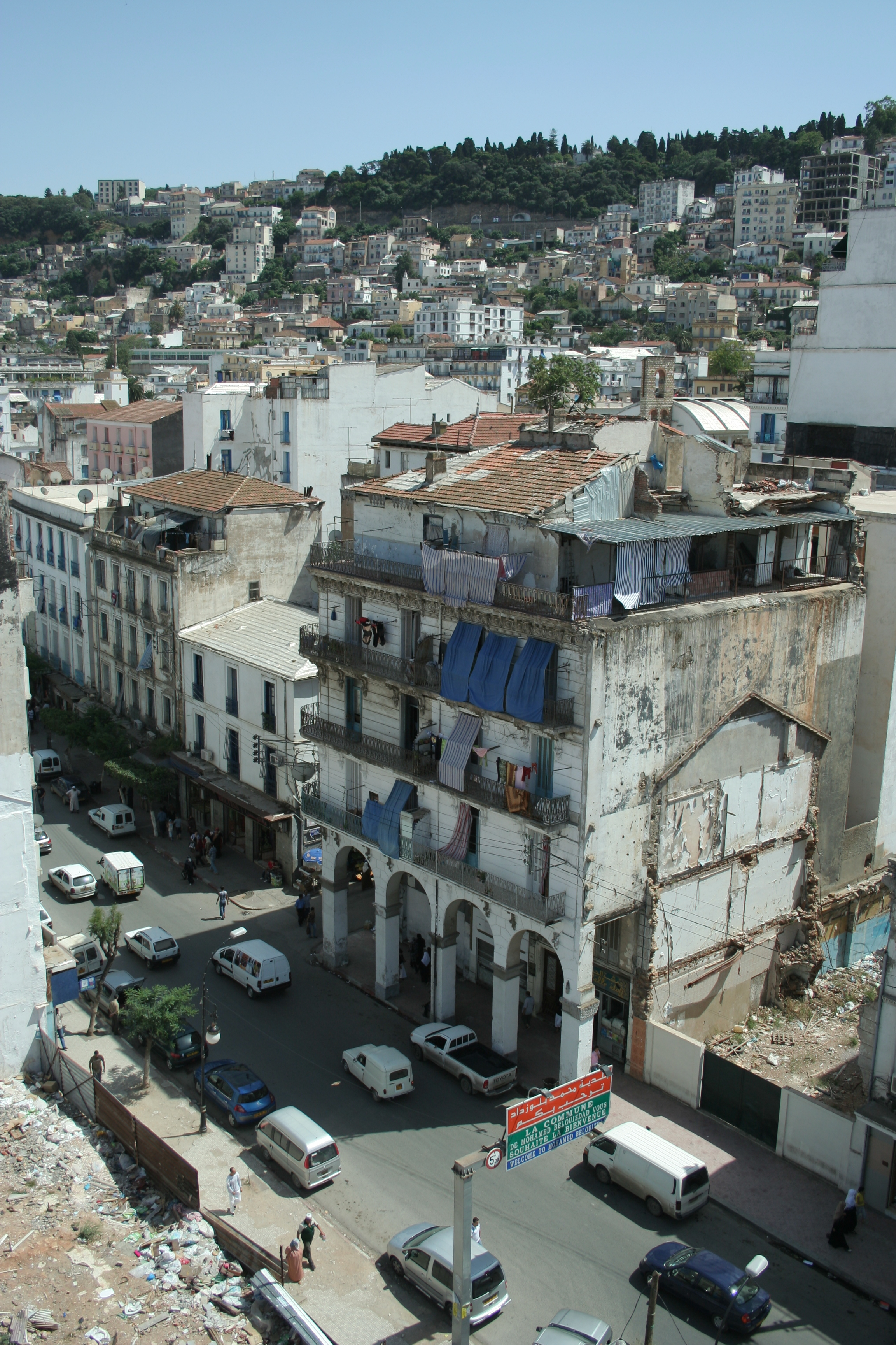 Alger, quartier Belouizdad (anciennement Belcourt). Vue de la rue Belouizdad (anciennement rue de Lyon), depuis l'immeuble au numéro 79.